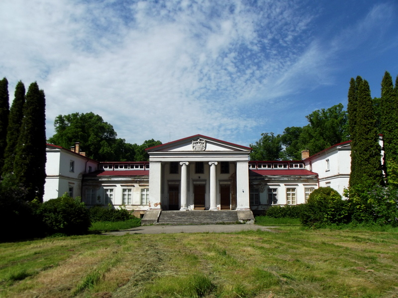 Zentenes muiža